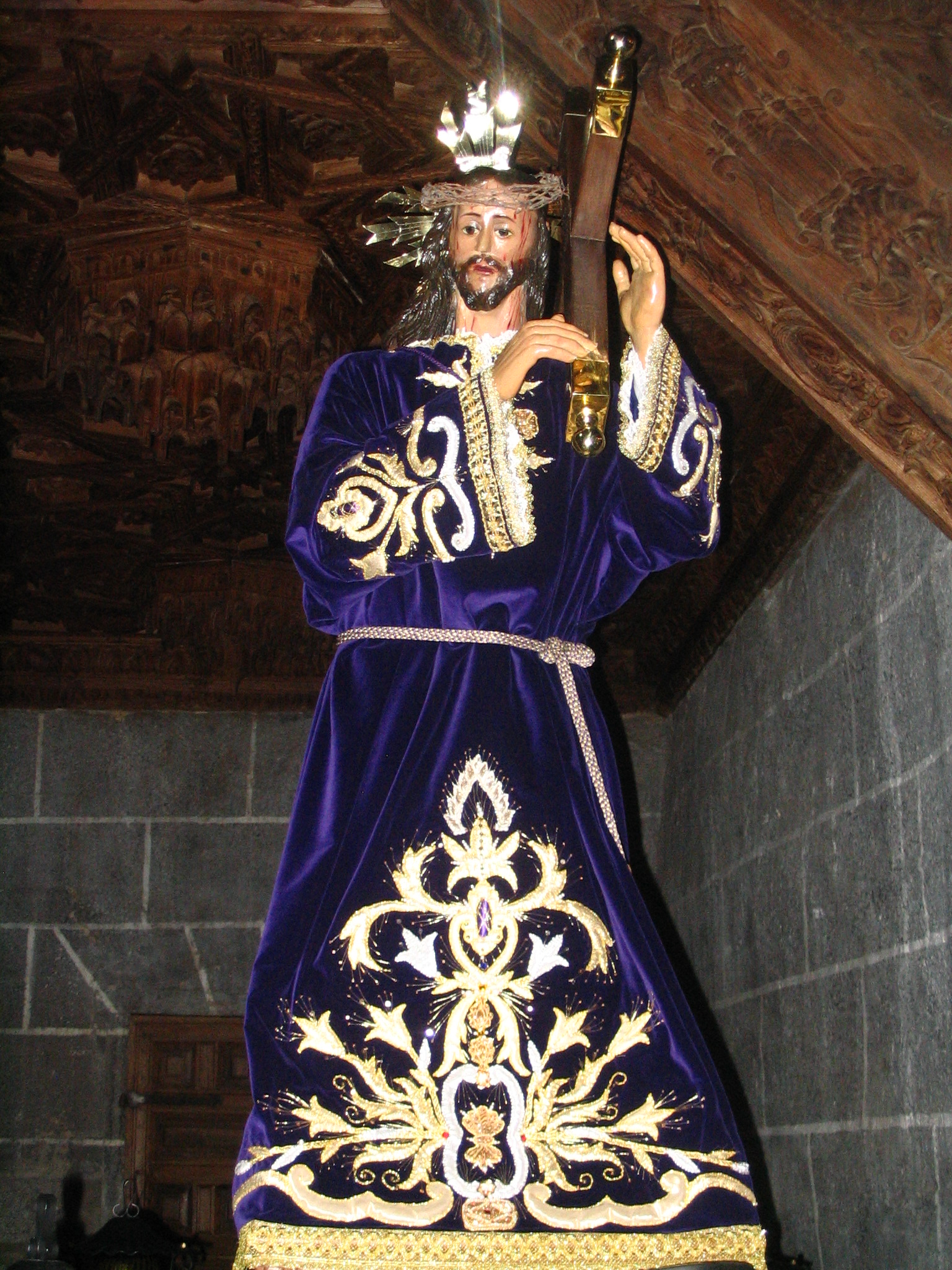 Imagen del Nazareno de Macotera